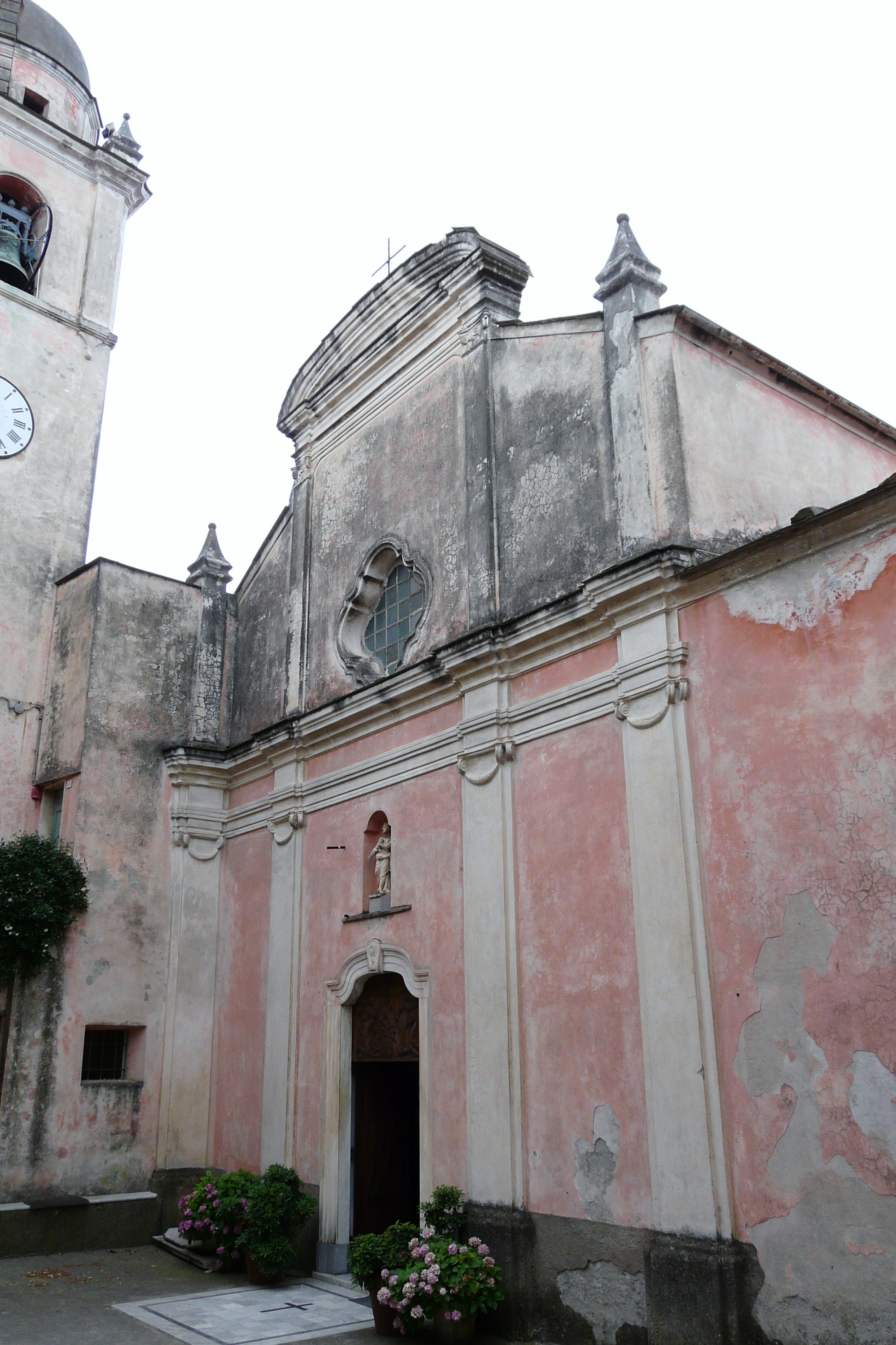 Chiesa di San Pietro, Montemarcello, Ameglia, Liguria, Italia